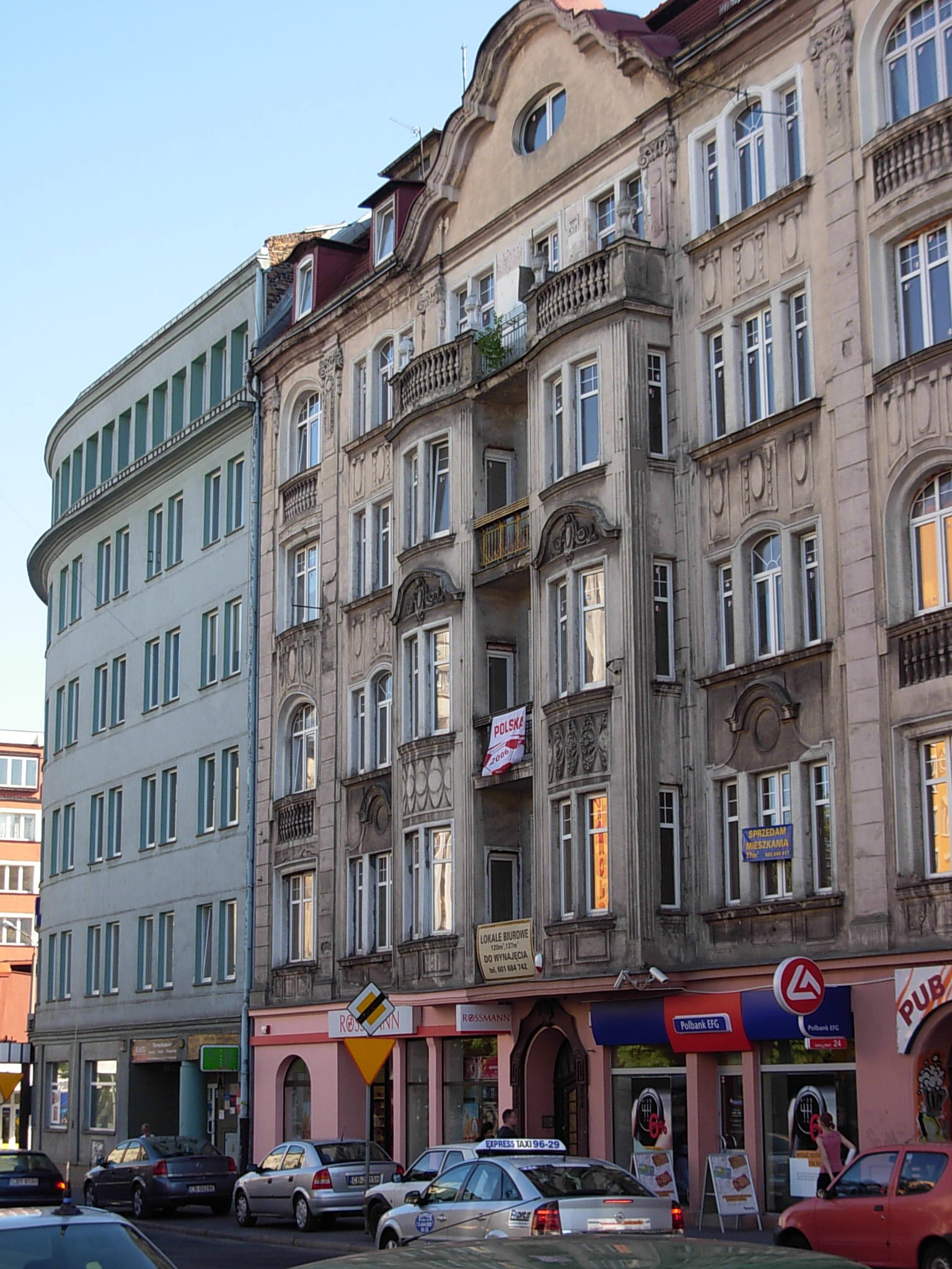 Kamienica ul. Dworcowa 73 w Bydgoszczy